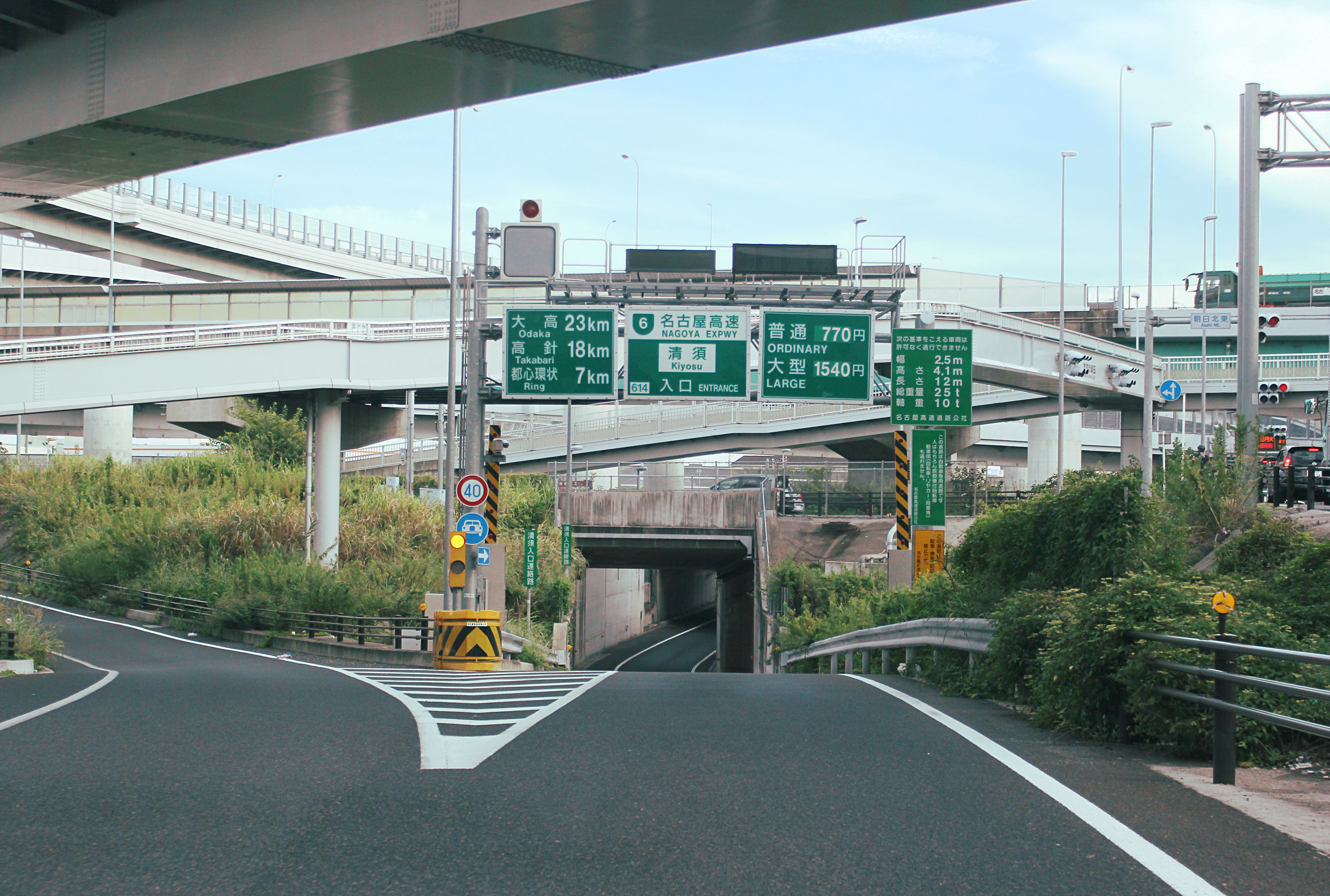 名古屋高速 清須入口（国道22号一宮方向からの入口）